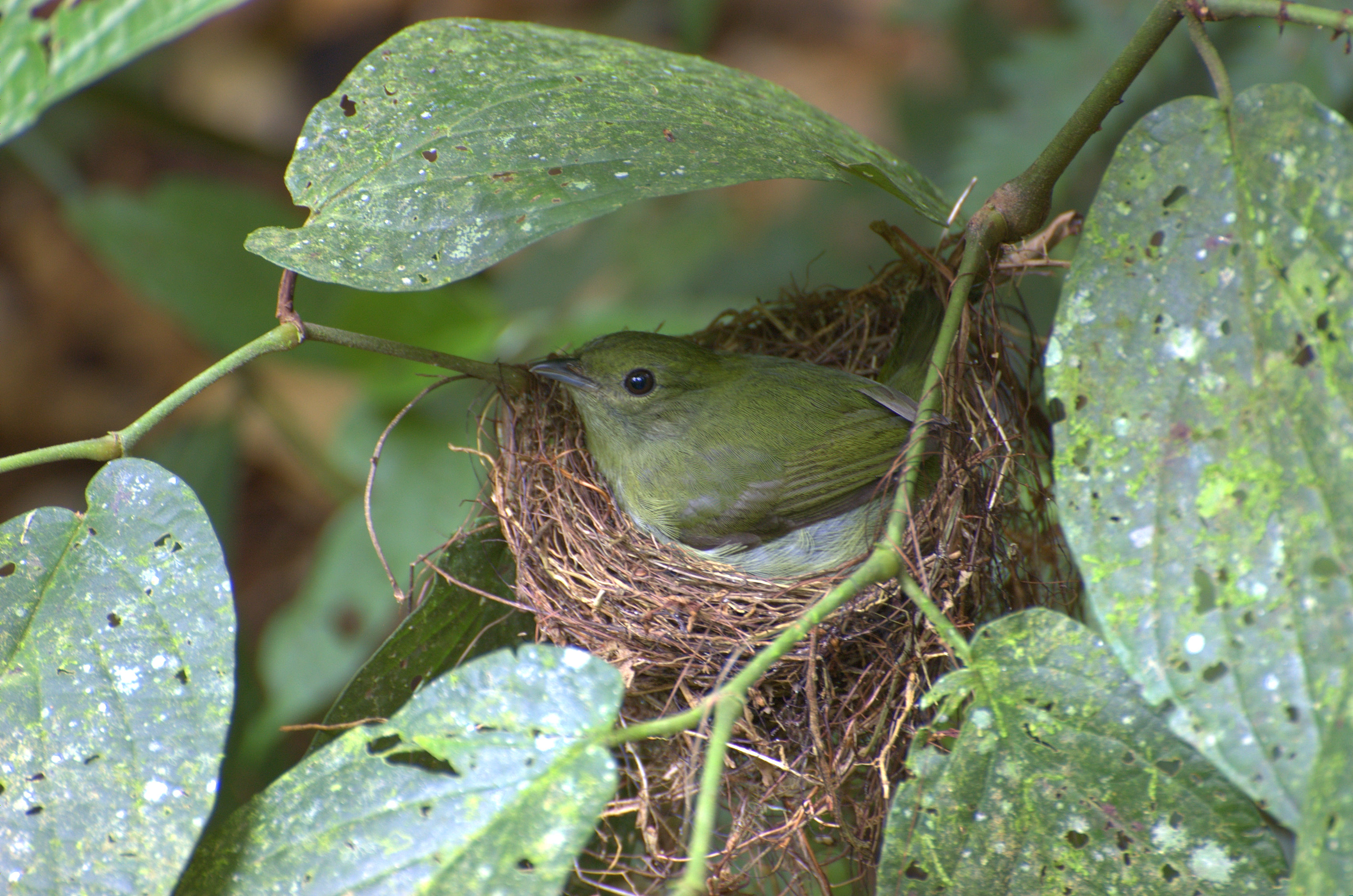 Palmito na Brasa - Ubatuba-SP - Brasil